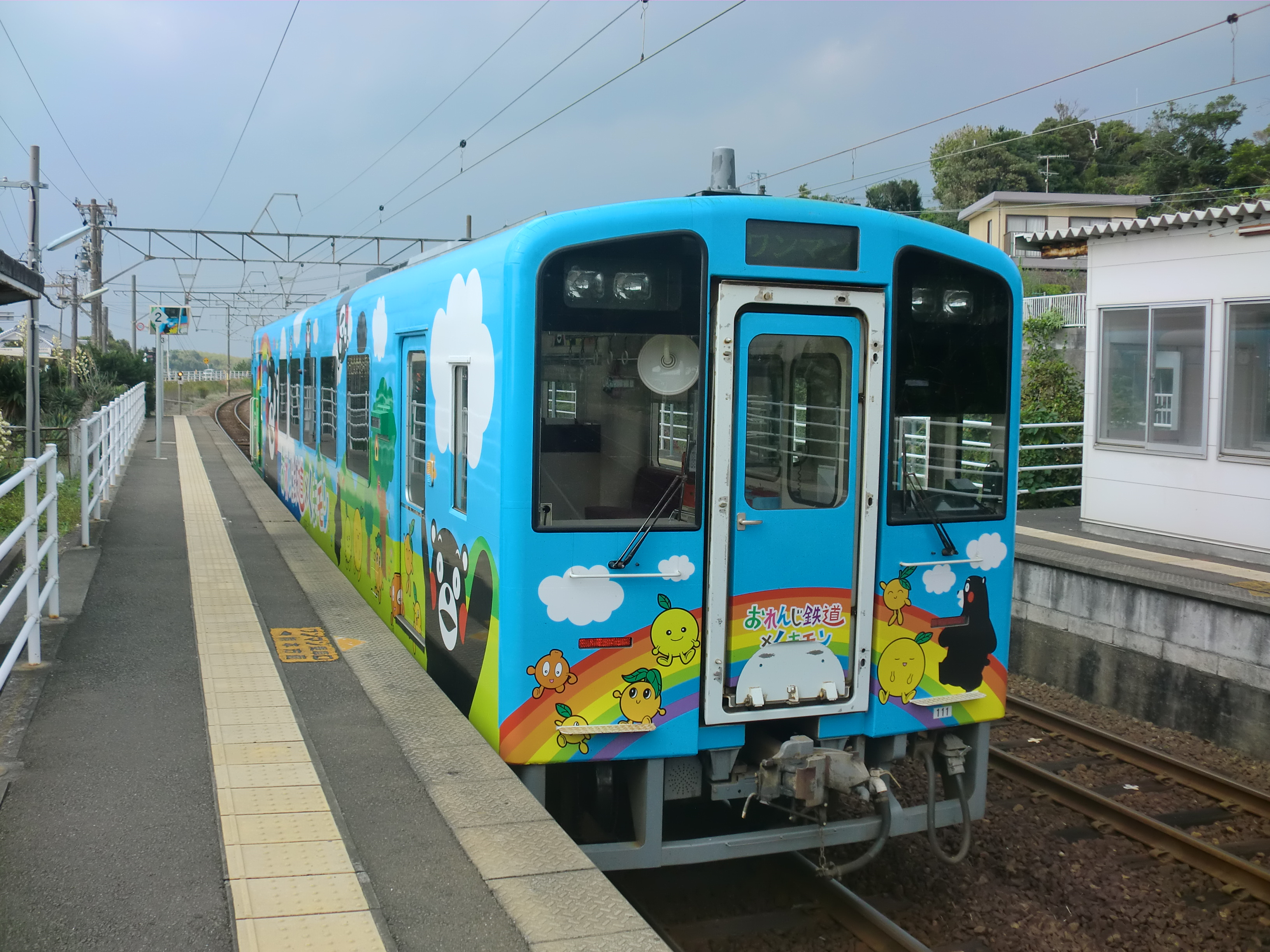 肥薩おれんじ鉄道 おれんじ鉄道×くまモン 車両（牛ノ浜駅で撮影）